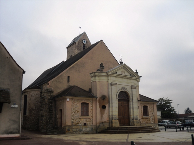 L'église Saint-Michel de Morangis (91)